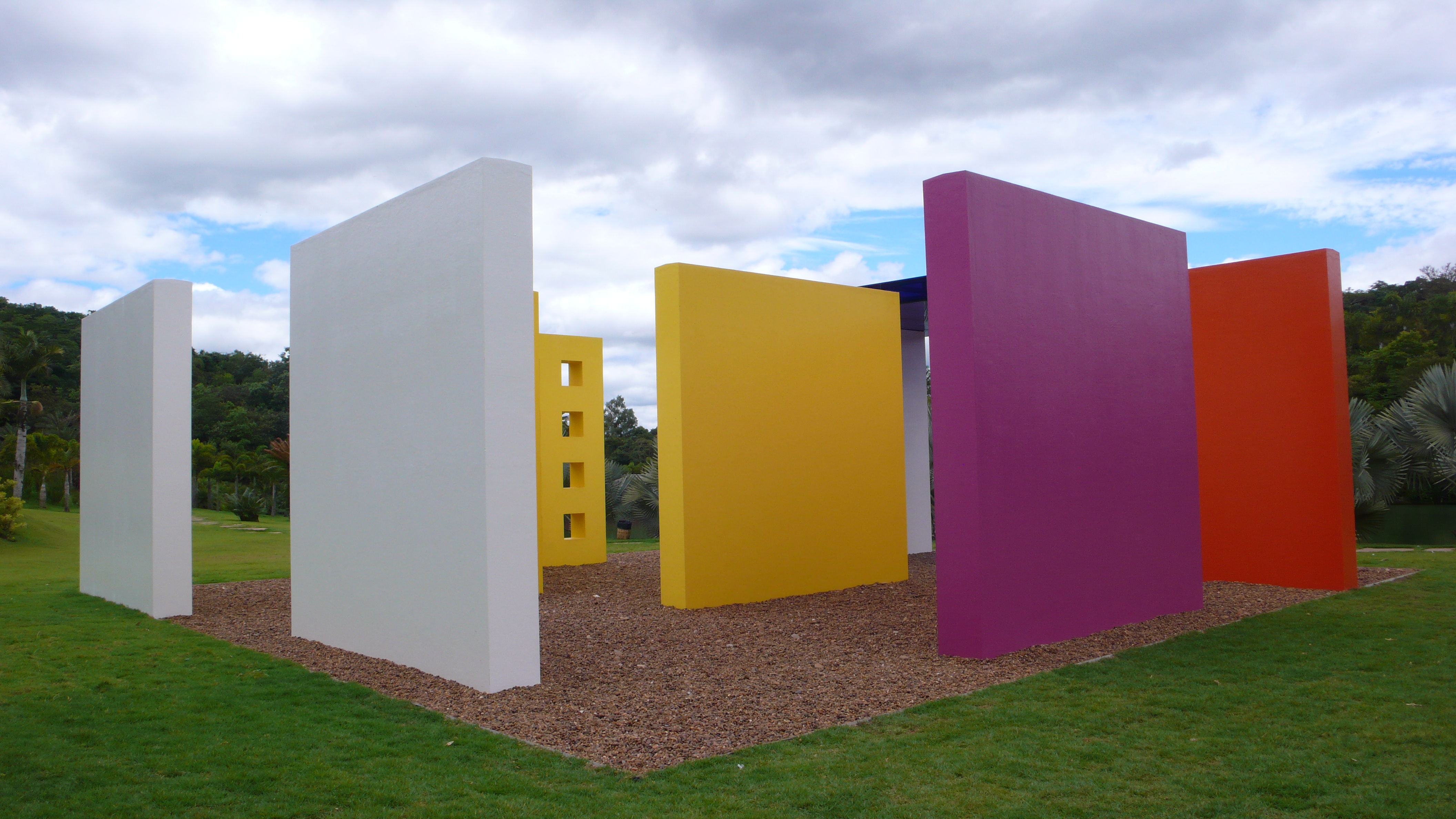 Hélio Oiticica at Instituto Cultural Inhotim in Brumadinho/Brazil